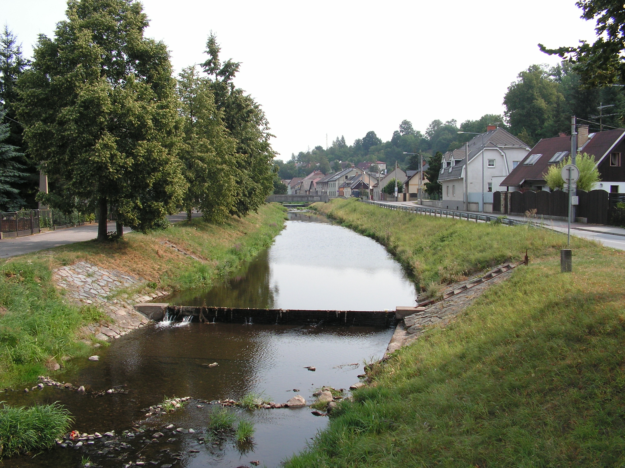 Řeka Kněžná v Rychnově nad Kněžnou za nízkého stavu vody